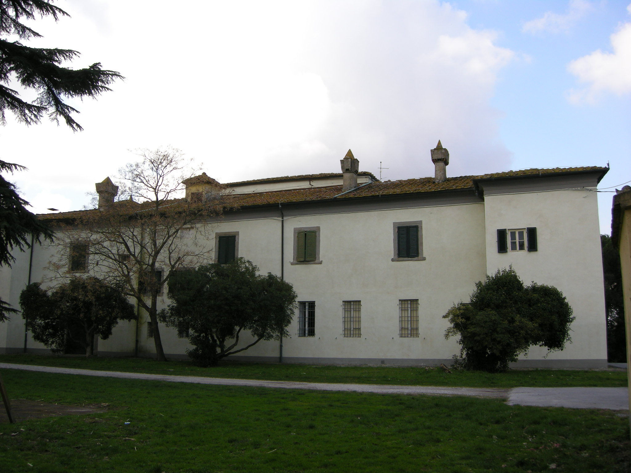 Villa di coltano 07 retro